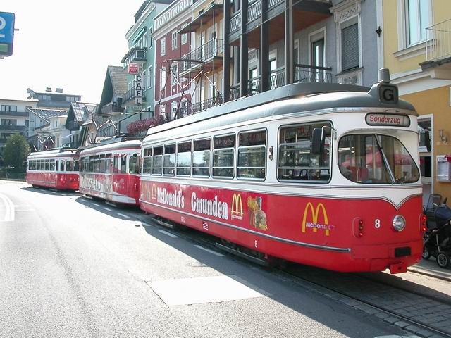 Fahrzeugparade